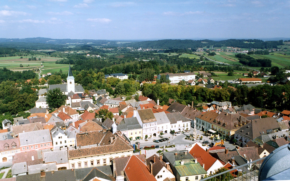 Weitra vue depuis les toits du château